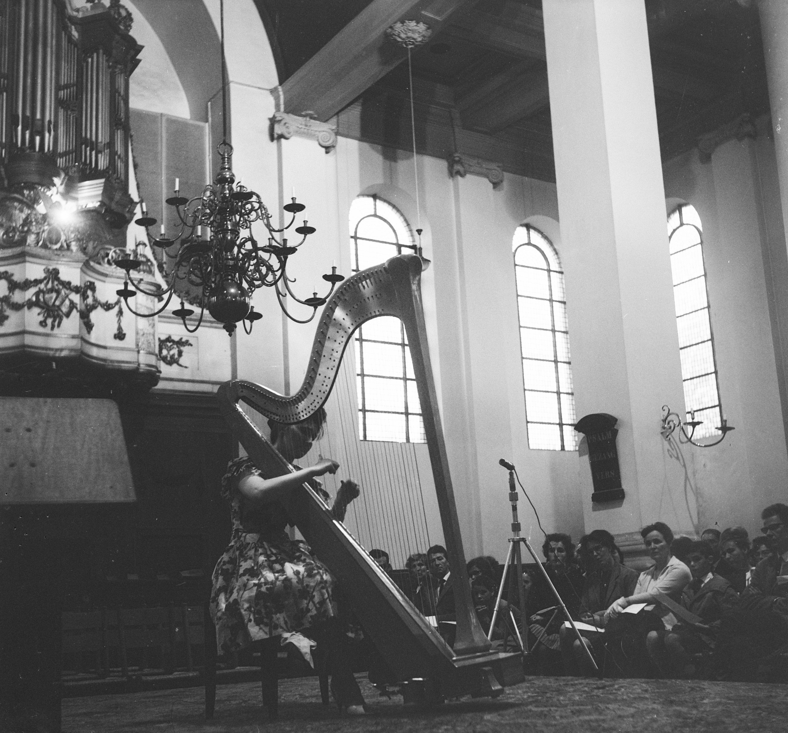 Collectie / Archief : Fotocollectie Anefo Reportage / Serie : [ onbekend ] Beschrijving : Slotconcert Internationale Harpweek 1963 . Maria Rosa Calvo Manzano Ruiz (Spanje) speelt in de Nieuwe Kerk te Haarlem Datum : 19 juli 1963 Locatie : Haarlem Trefwoorden : kerken, slotconcerten Fotograaf : Nijs, Jac. de / Anefo Auteursrechthebbende : Nationaal Archief Materiaalsoort : Negatief (zwart/wit) Nummer archiefinventaris : bekijk toegang 2.24.01.03 Bestanddeelnummer : 915-3660